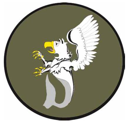 Oznaka rozpoznawcza 44 bazy lotnictwa morskiego do munduru polowego